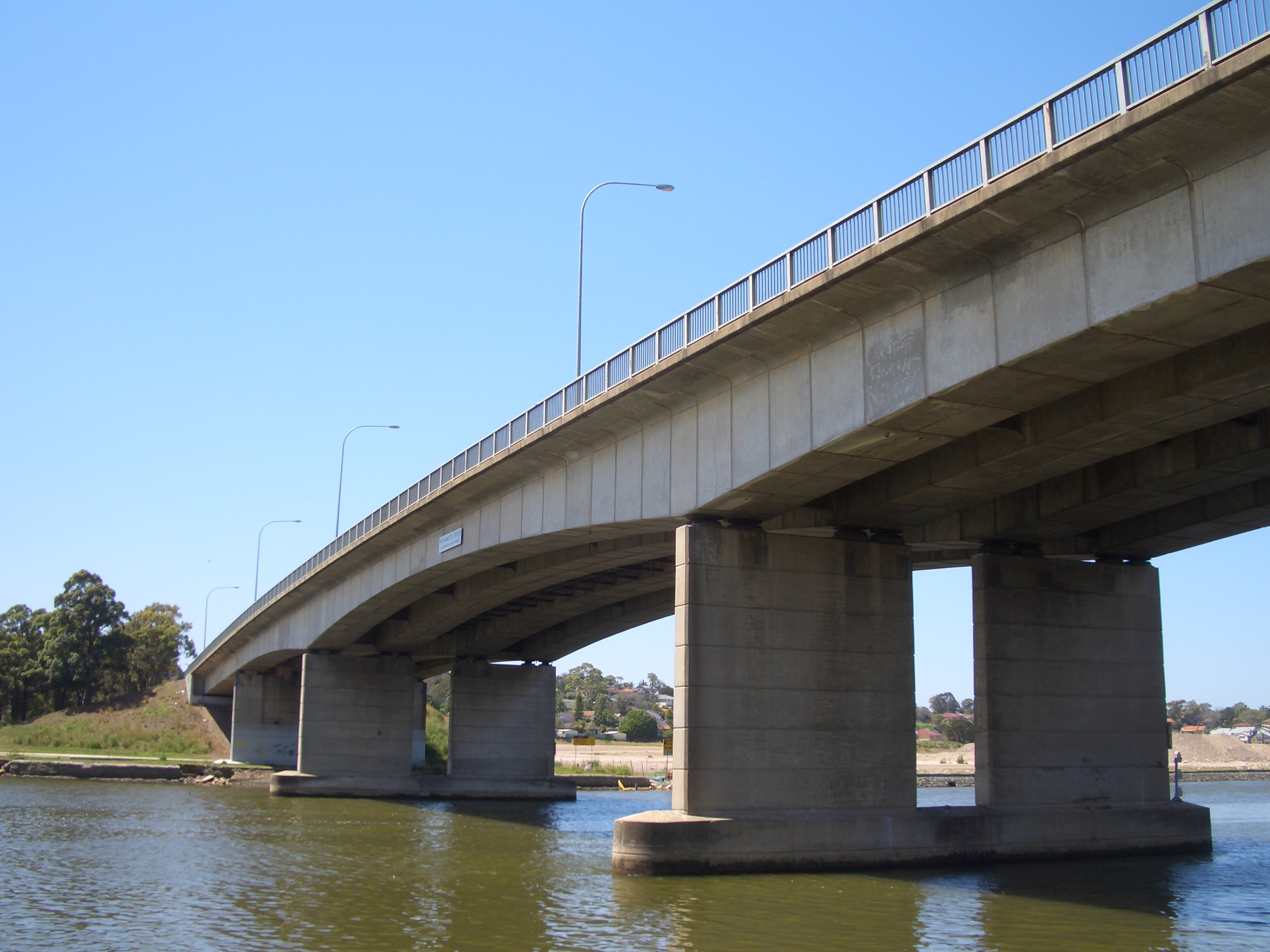 Silverwater Bridge